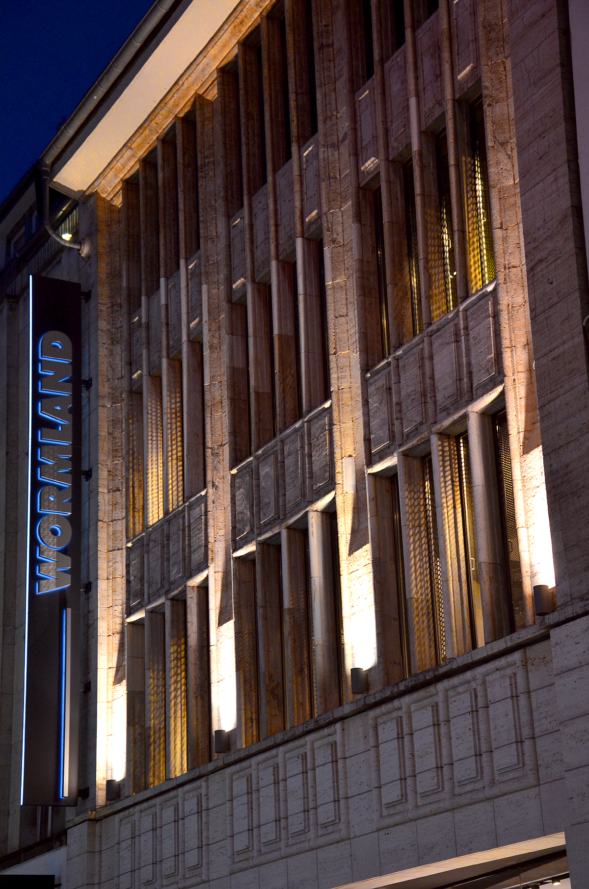 Die denkmalgeschützte, abends illuminierte Fassade des Herrenausstatters Wormland in der Große Packhofstraße in Hannover ...